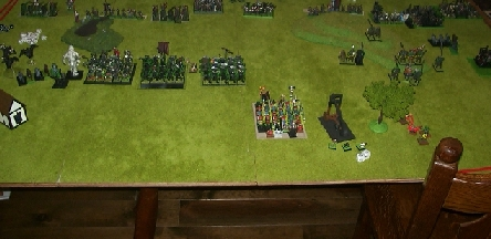 Een tafel ter illustratie van tabletop. (Dit is een eigen foto, mag vrij gebruikt worden. JPm 27 mrt 2004 16:05 (CET))